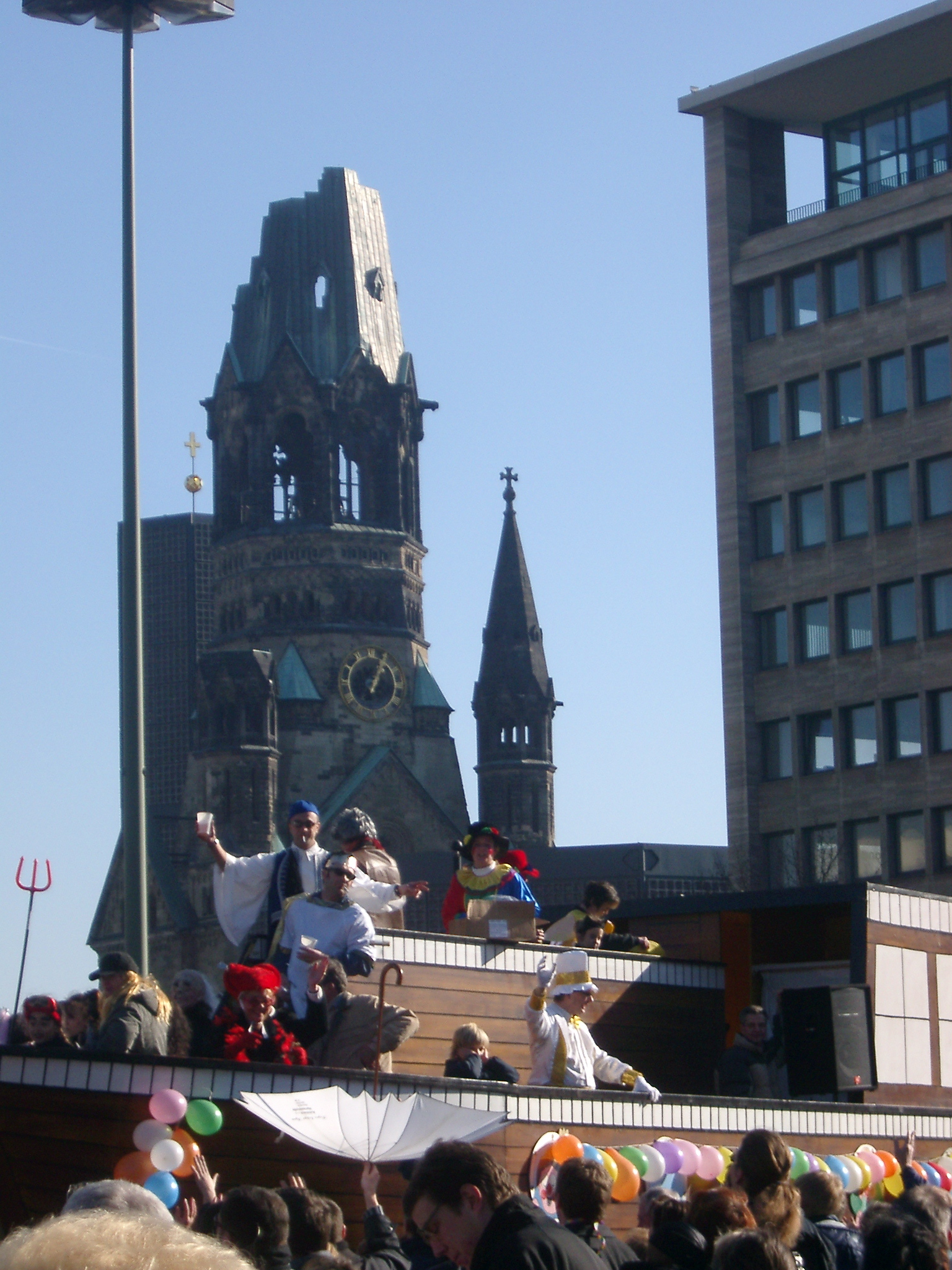 Berlin carneval in front of "Kaiser-Wilhelm-Gedächtniskirche"